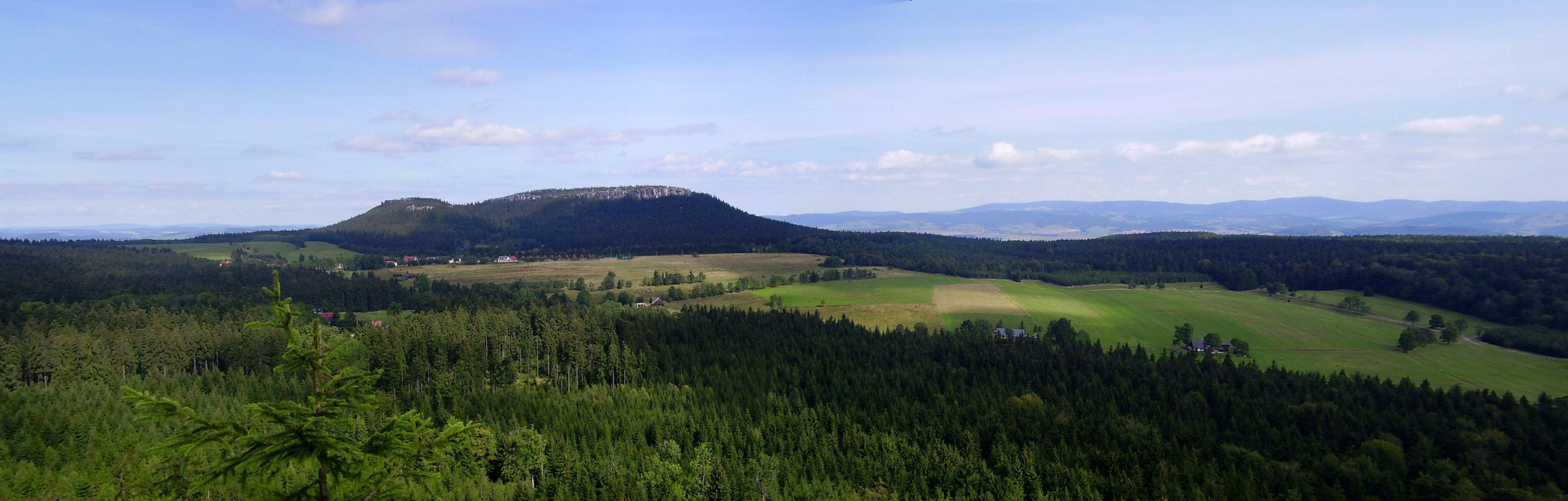 Masyw Szczelińca (Góry Stołowe). Po lewej Szczeliniec Mały, po prawej Szczeliniec Wielki (najwyższy szczyt pasma). Widok z Fortu Karola.